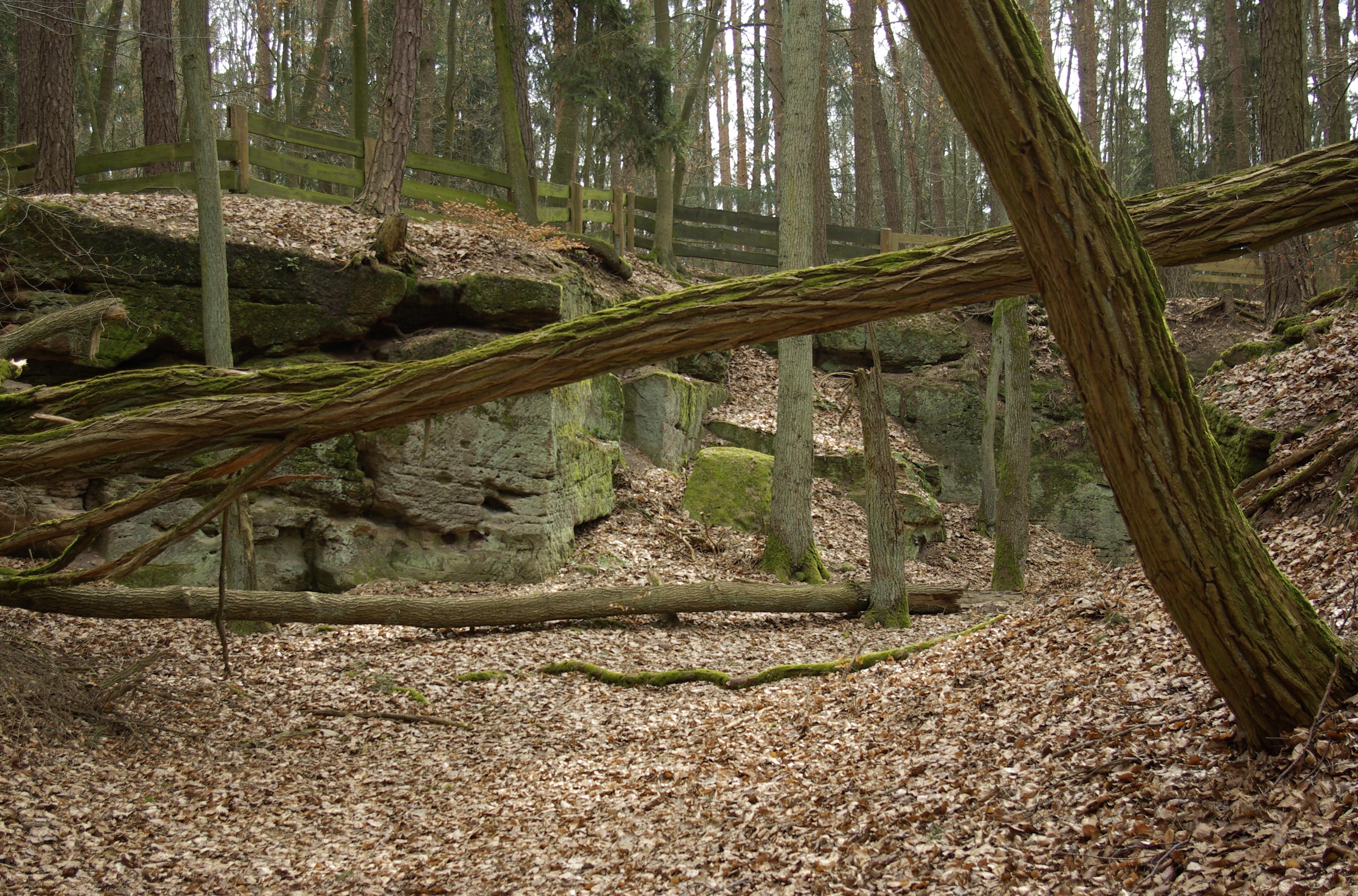 Ehemalige Sandsteinbrüche am Hinteren Giesberg im Markwald im Landkreis Erlangen-Höchstadt.